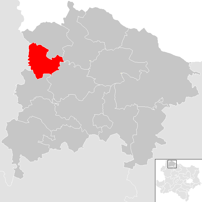 Bezirk Waidhofen an der Thaya